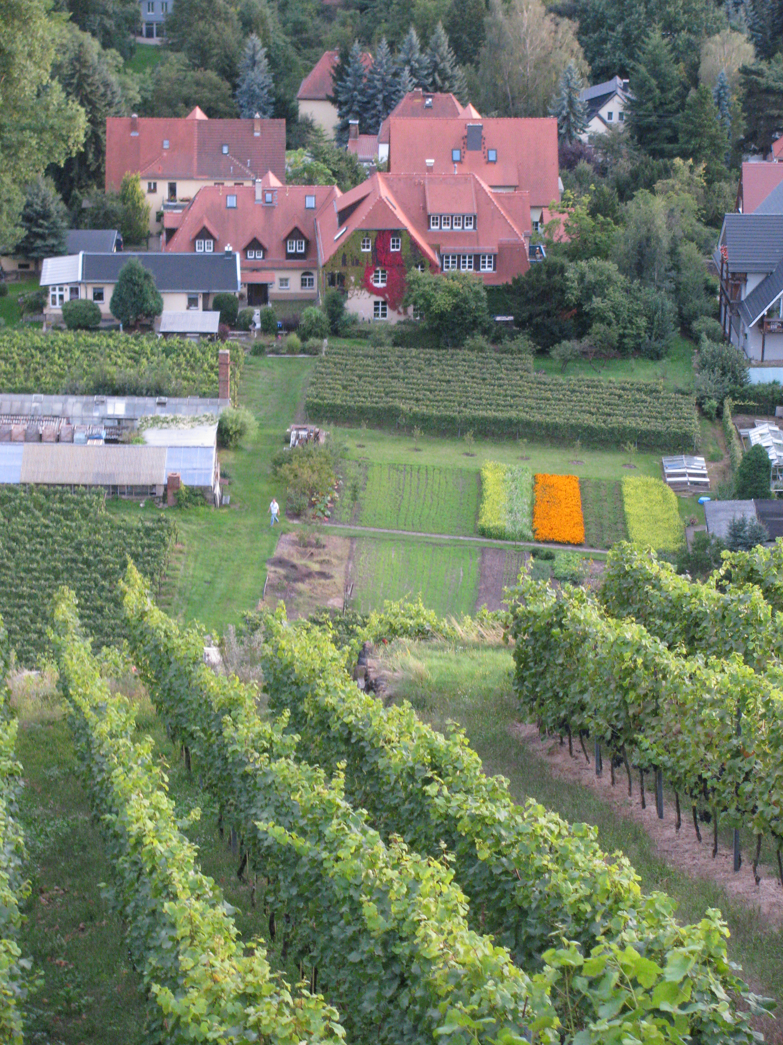 Radebeul, Landhaus Richard Lange von oben